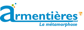 Nouveau logo d'Armentières